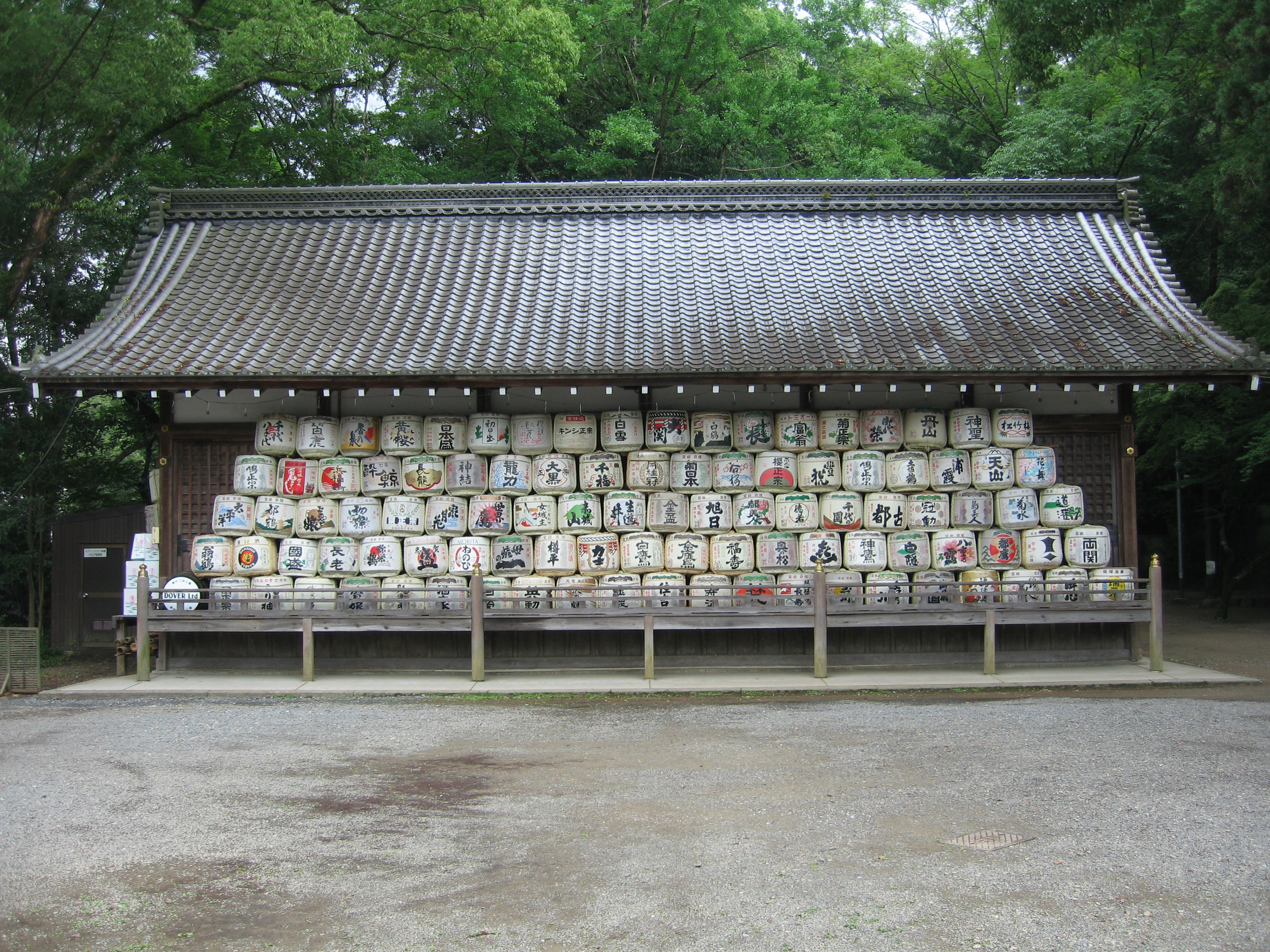 Sake Barrels